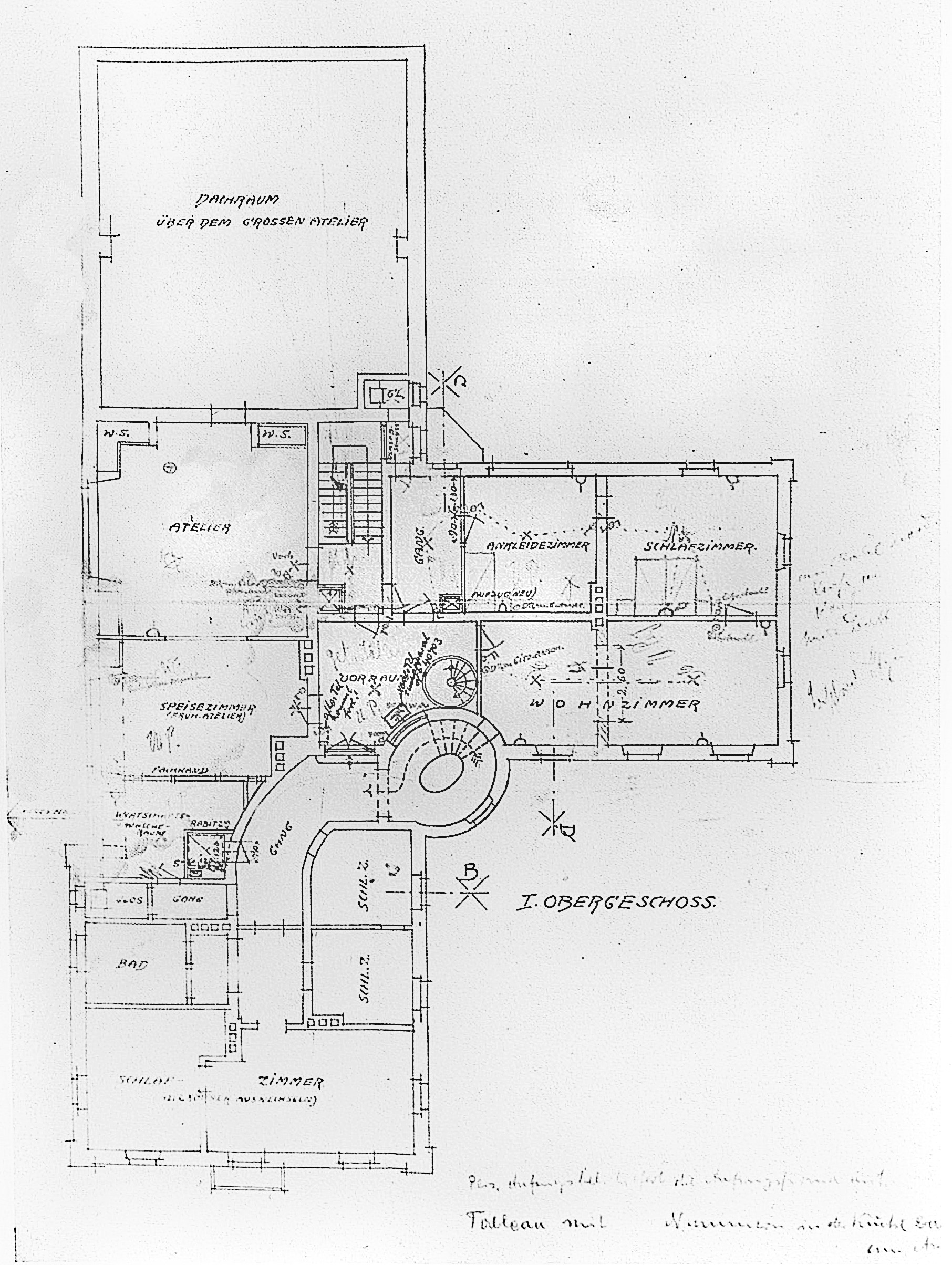 Pläne des Hildebrandhauses in München, 1. Obergeschoss, Entwurf durch Gabriel von Seidl, Ergänzungen von Adolf von Hildebrand